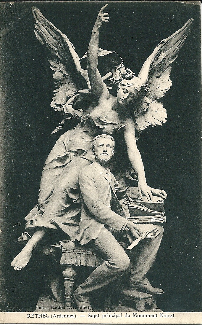 Rethel (Ardennes - France) - Statue de la sépulture Noiret au cimetière de Rethel.